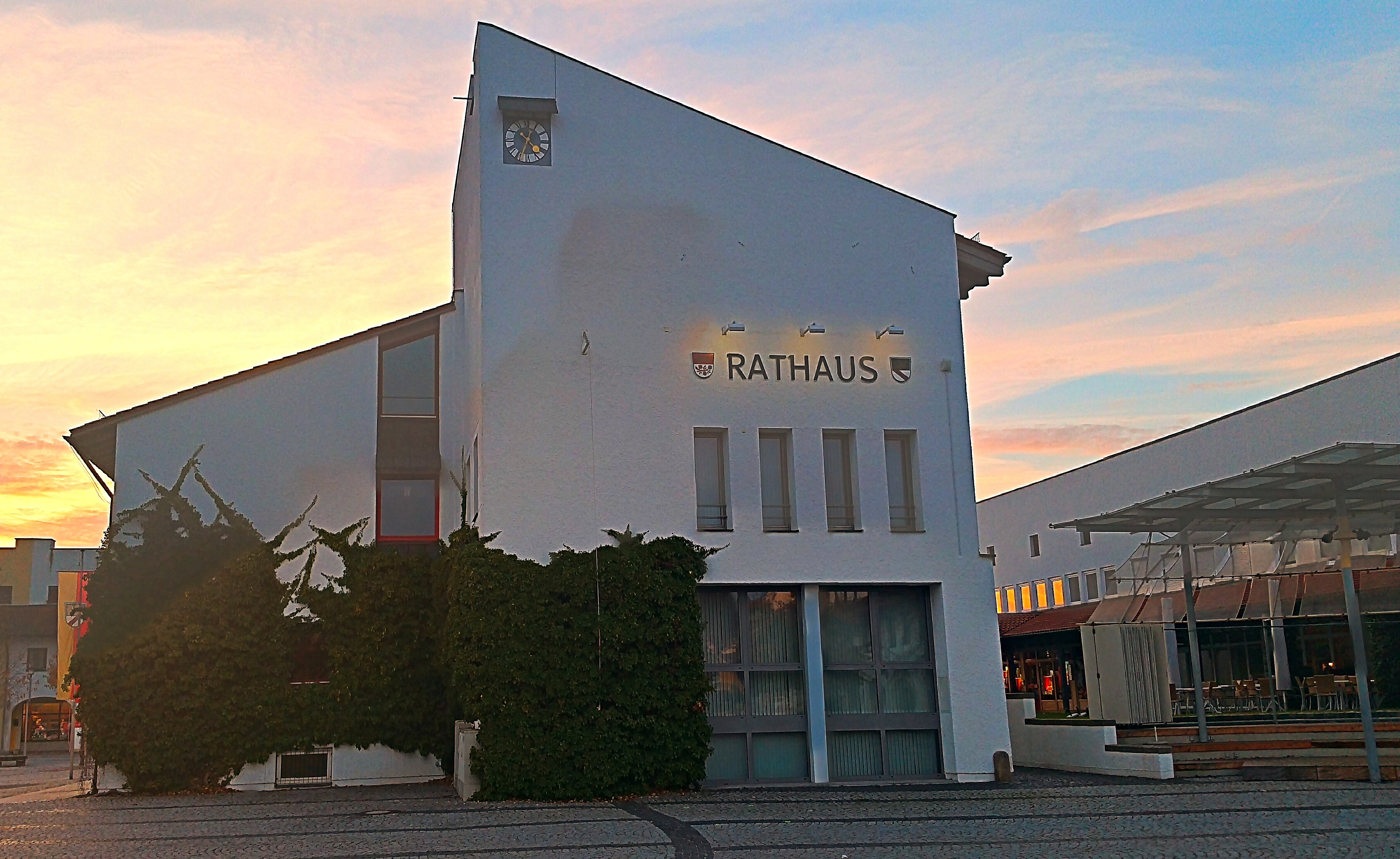 Deutschland, Bayern, Niederbayern, Landkreis Rottal-Inn, Bad Birnbach, Rathaus